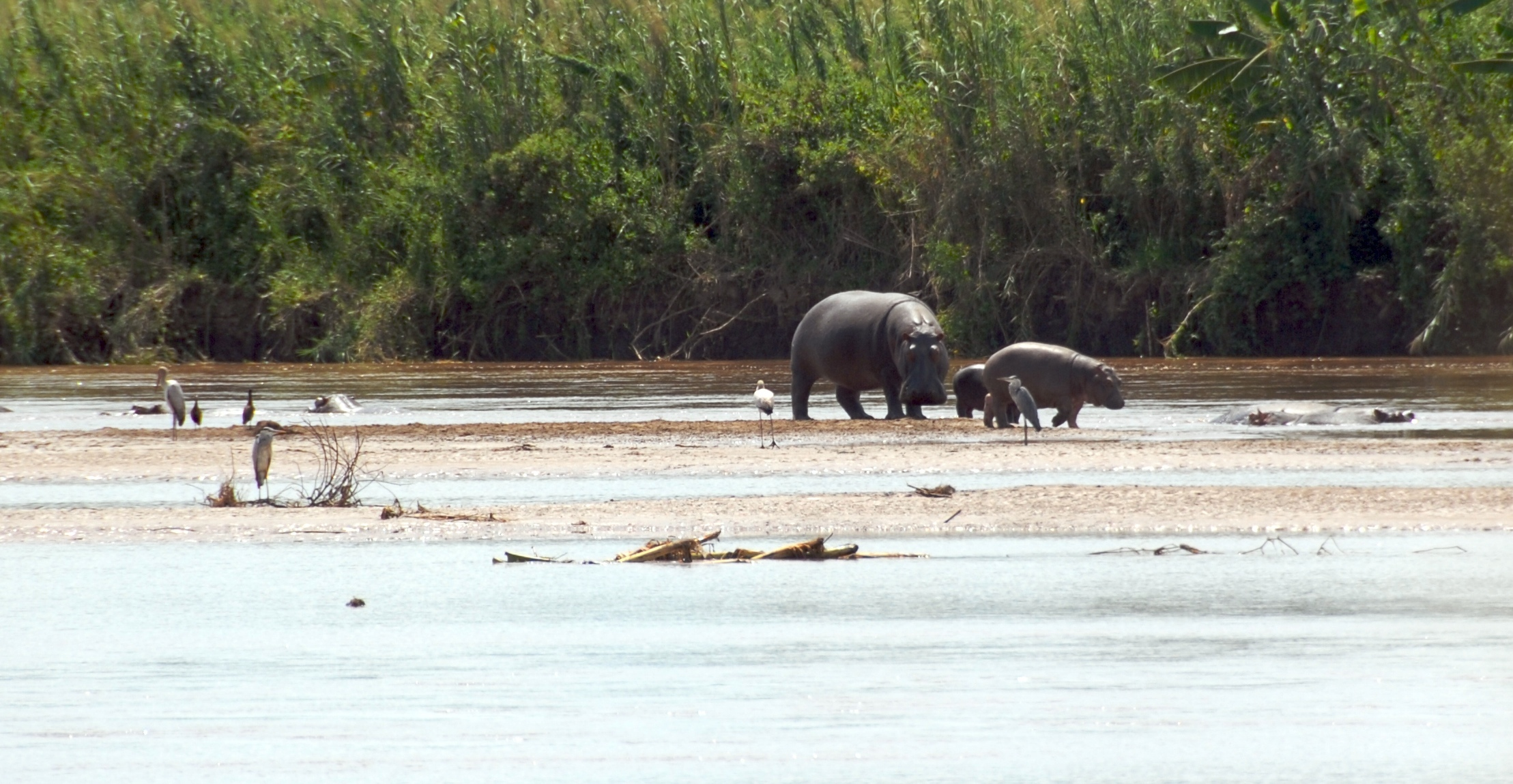 Rusizi National Park